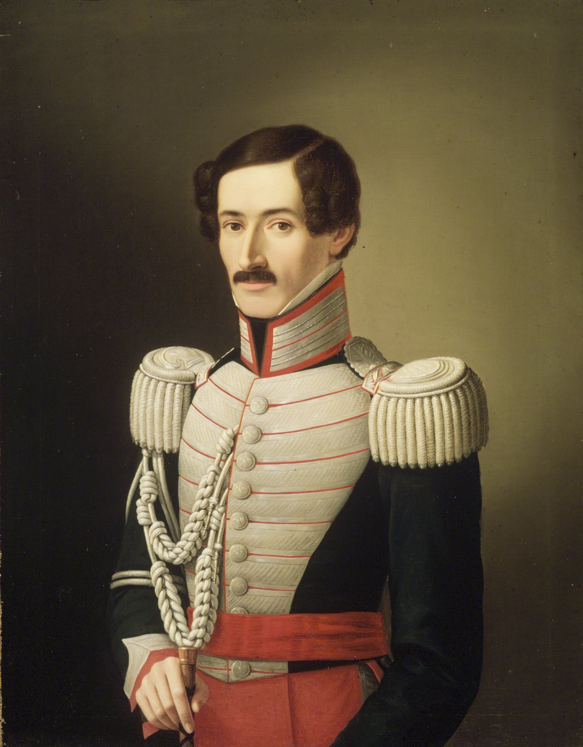 Retrato